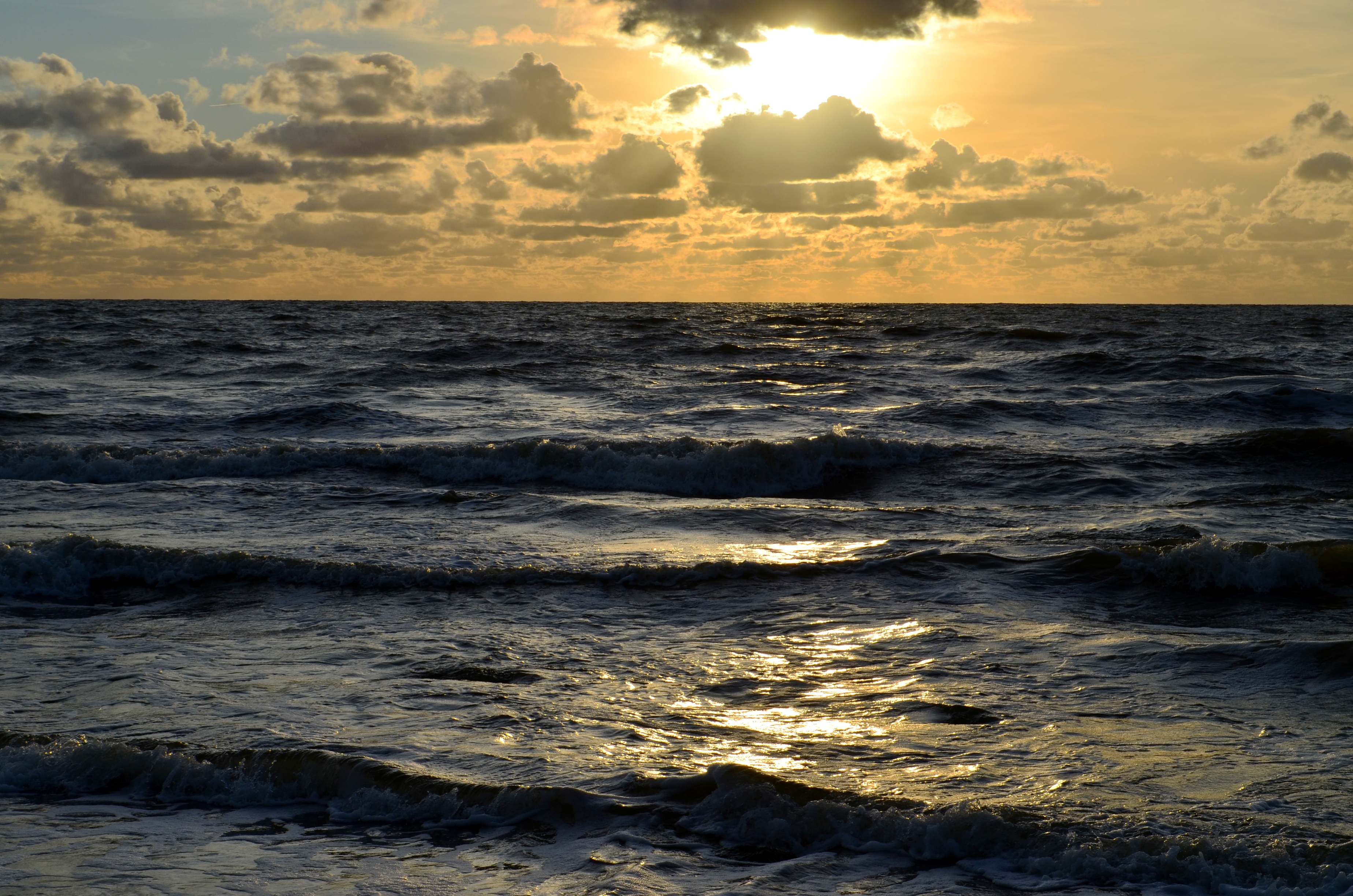 Baltijos jūra ties Karkle, Klaipėdos raj.